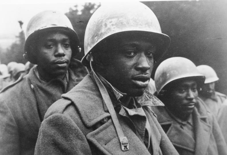 Gefangene aus der Westoffensive werden eingebracht Zwischen dem Hohen Venn und dem Nordteil Luxemburgs sind starke deutsche Kräfte seit dem 16.12.1944 im Angriff und haben die Stellungen der Nordamerikaner überrannt. Schon in den ersten Tagen machten unsere Truppen tausende von Gefangenen, die nun anders als sie erhofft hatten, den Marsch auf deutschen Boden in die Gefangenschaft antreten. Unter den Gefangenen befinden sich zahlreiche Schwarze. PK: Scheck-TO/EP. 28.12.44 [Herausgabedatum]